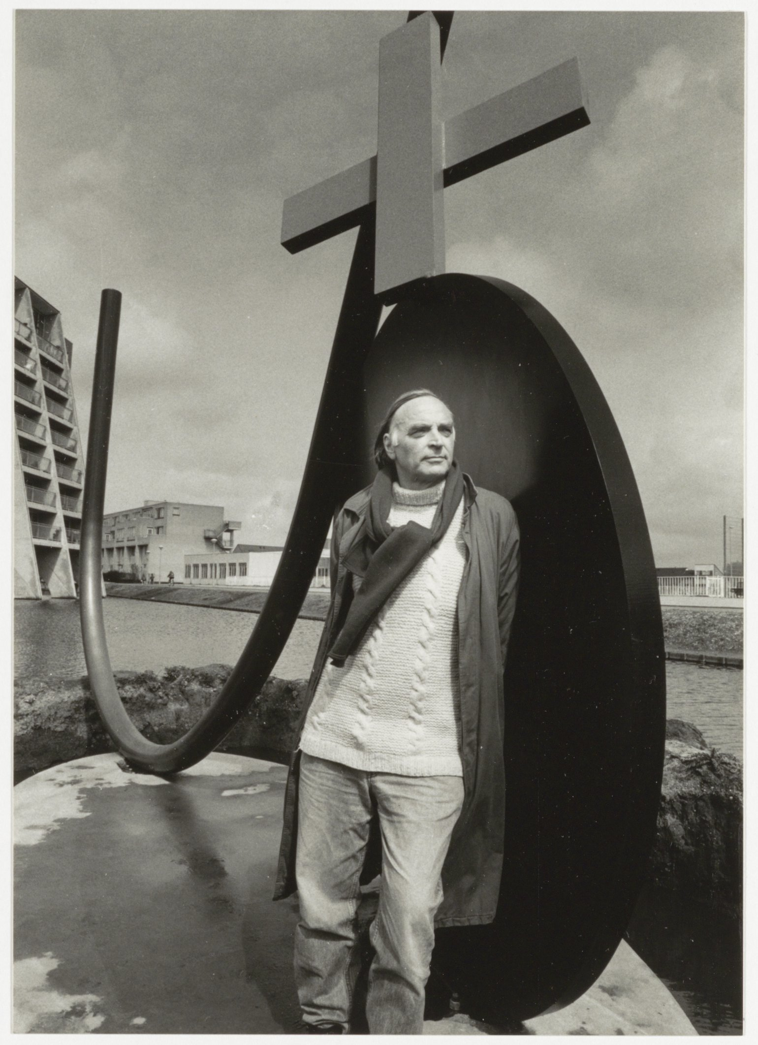 CollectieCollectie Fotoburo de BoerInventarisnummerNL-HlmNHA_54035134NL-HlmNHA_1478_39612KBeschrijvingKunstenaar Auke de Vries bij zijn kunstwerk in waterpartij middengebied Zuiderpolder. Links is de 'scheve" flat aan de Solidarnoscstraat nog net zichtbaar.FotonummerNL-HlmNHA_1478_5045DocumenttypePortrettenVervaardigerPichel, Ron (UP de Boer) Soort vervaardigerFotograaf AnnotatiesHD050594LandNederland ProvincieNoord-Holland GemeenteHaarlem PlaatsHaarlem GeografischZuiderpolder Datering gebeurtenis04-05-1994TechniekFoto Trefwoordenbeeldende kunsten